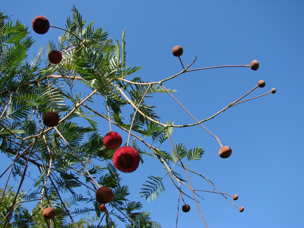 Parkia platycephala (=Parkia pendula) - FABACEAE Brasília - Distrito Federal - Brasil.